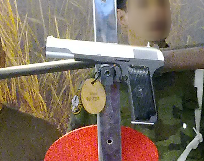 Пиштољ М70А на сајму НВО у Београду.